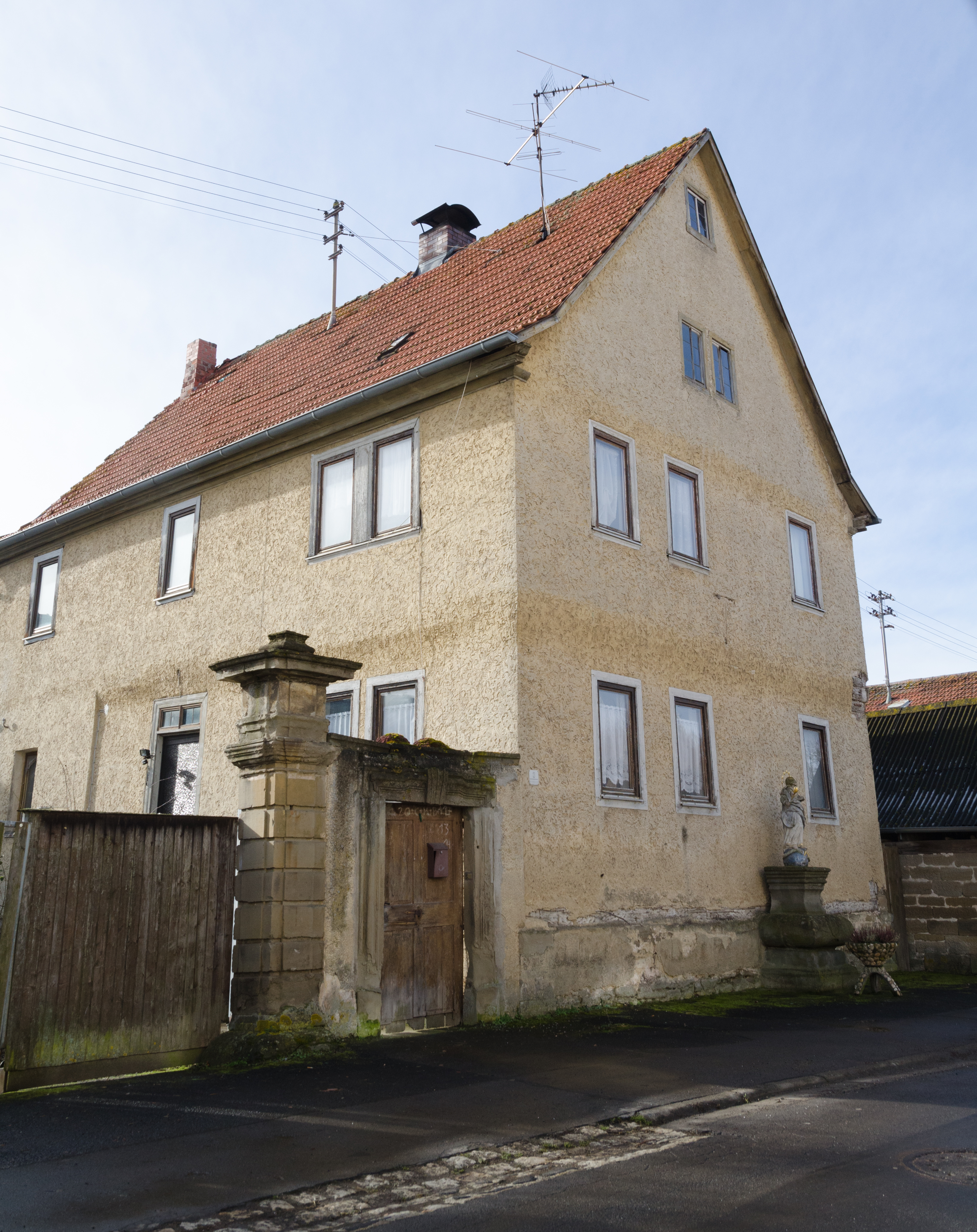 Sulzdorf an der Lederhecke, Obereßfeld, Karl-Hoffmann-Straße 3